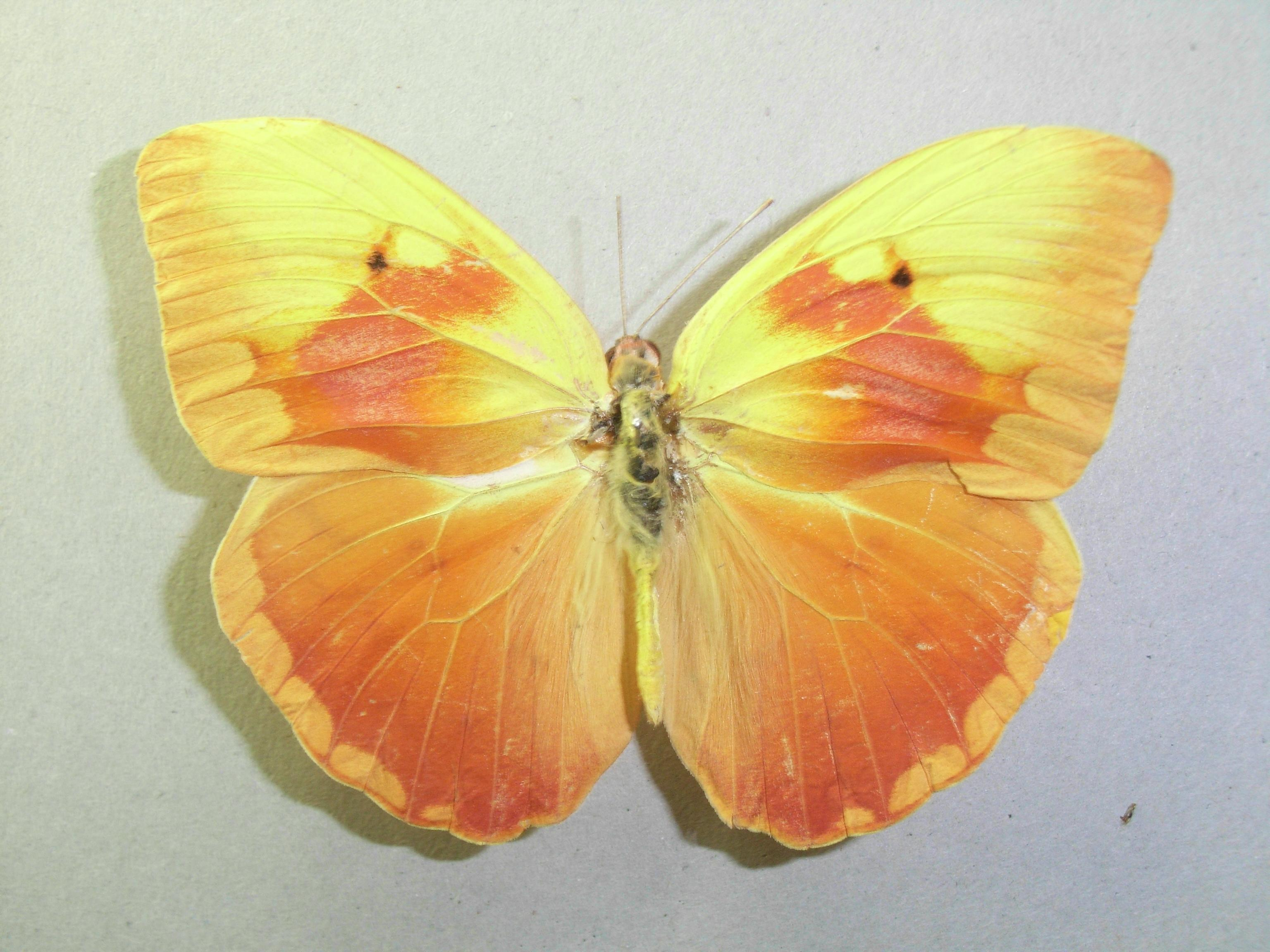 Phoebis avellaneda (Lepidoptera: Pieridae)